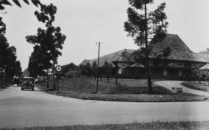 Foto. Straatgezicht bij de afdeling A van het Rode Kruis Ziekenhuis in Buitenzorg